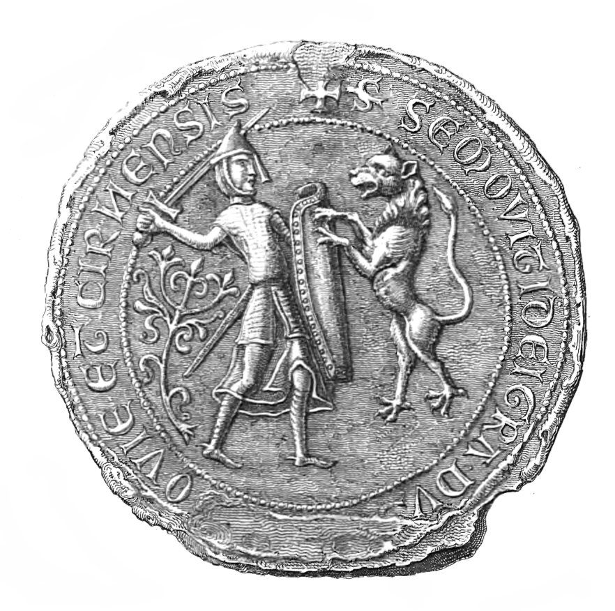 Siemowiet I Mazowiecki seal